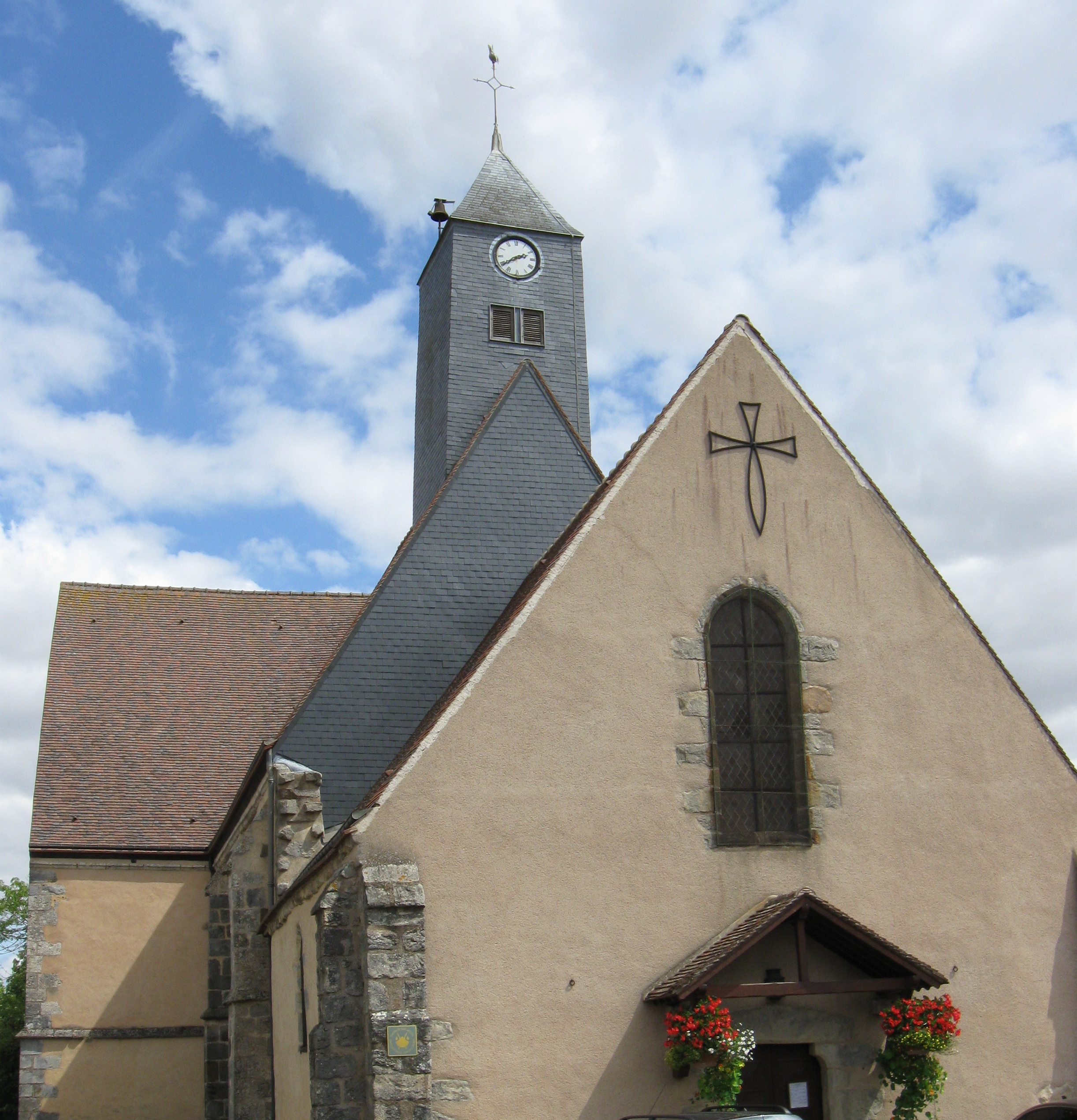 Église Saint-Jacques-Saint-Philippe de Soulaires. (Eure-et-Loir, région Centre-Val de Loire).